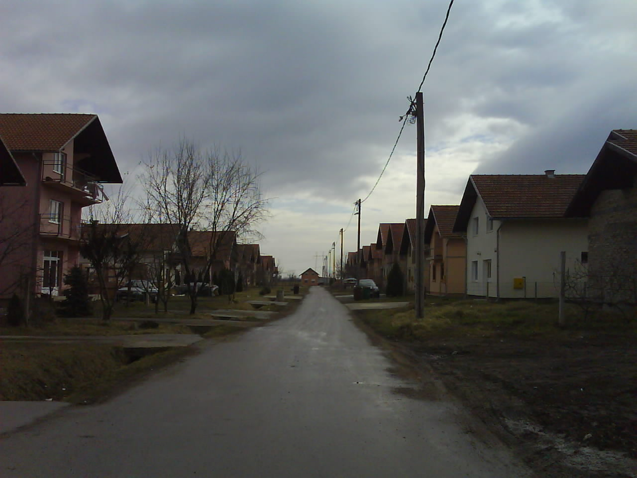 Кудељара, нови део Темерина